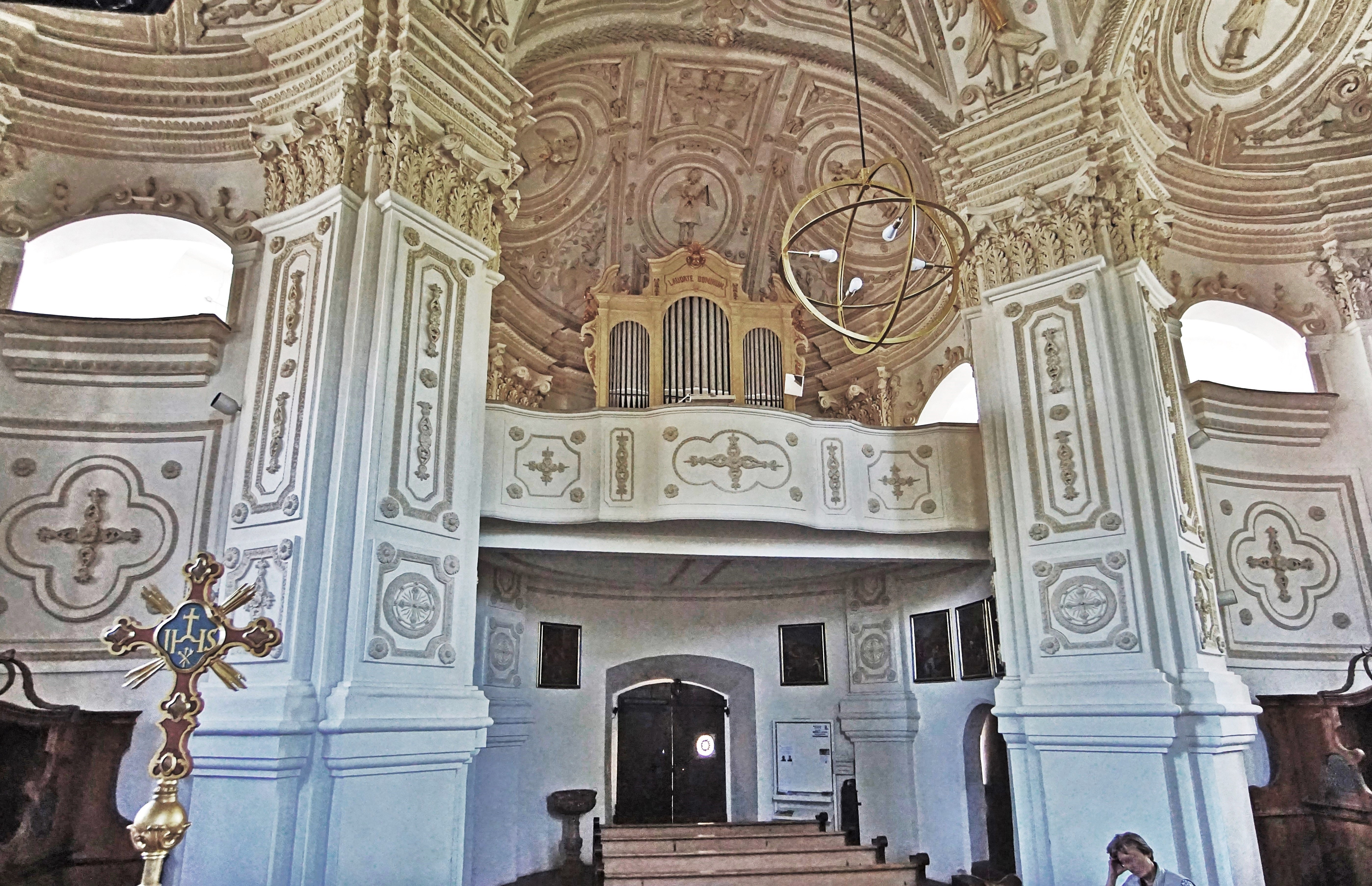 Die Orgelempore der Kirche St. Johann Baptist und Heilig Kreuz in Westerndorf am Wasen, Rosenheim